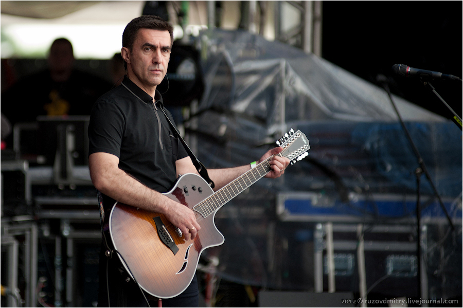 Вячеслав Бутусов, фестиваль "Рок над Волгой" 2012